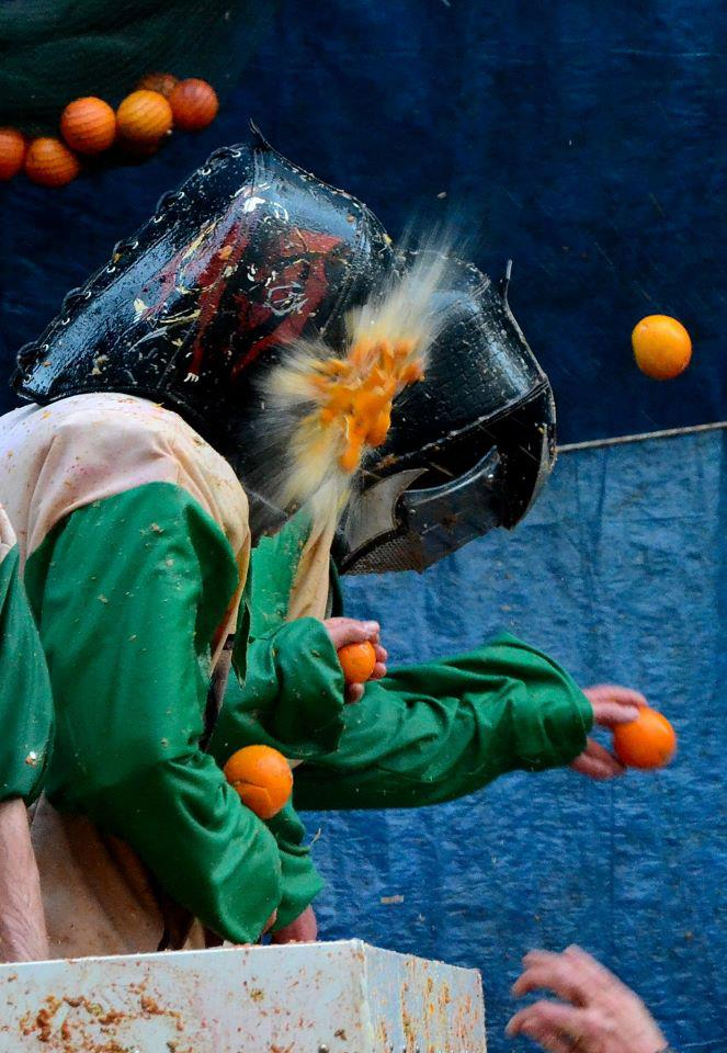 battaglia delle arance, Ivrea, 2013